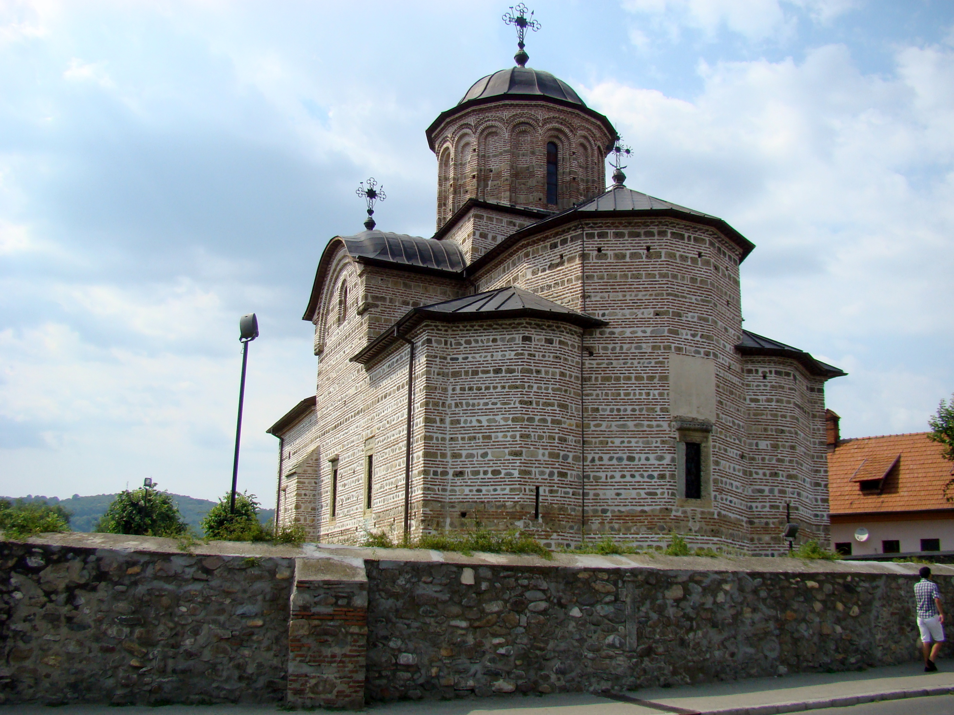 Biserica "Sf. Nicolae" - Domnesc din Curtea de Argeș 01